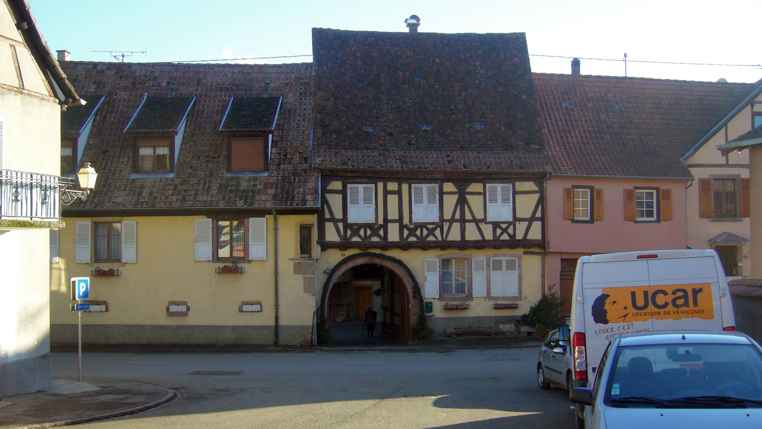 Maison vigneronne datée de 1685 située 35 rue du Maréchal Leclerc à Hattstatt